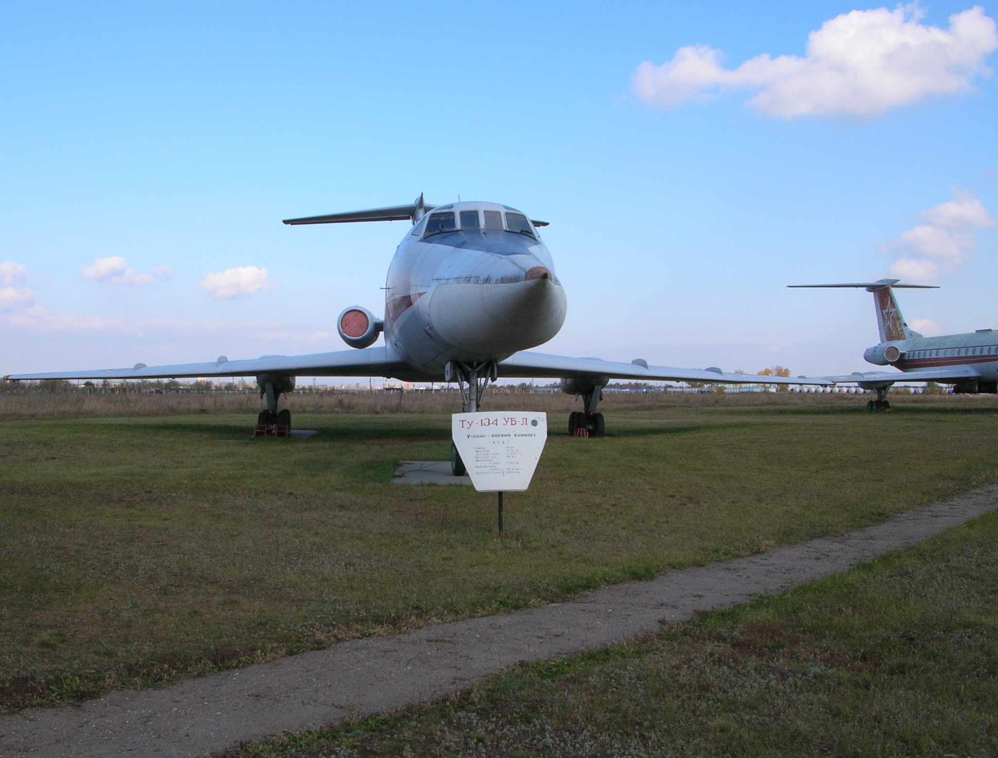 Самолёт Ту-134УБЛ в музее дальней авиации на авиабазе Энгельс, Саратовская область.